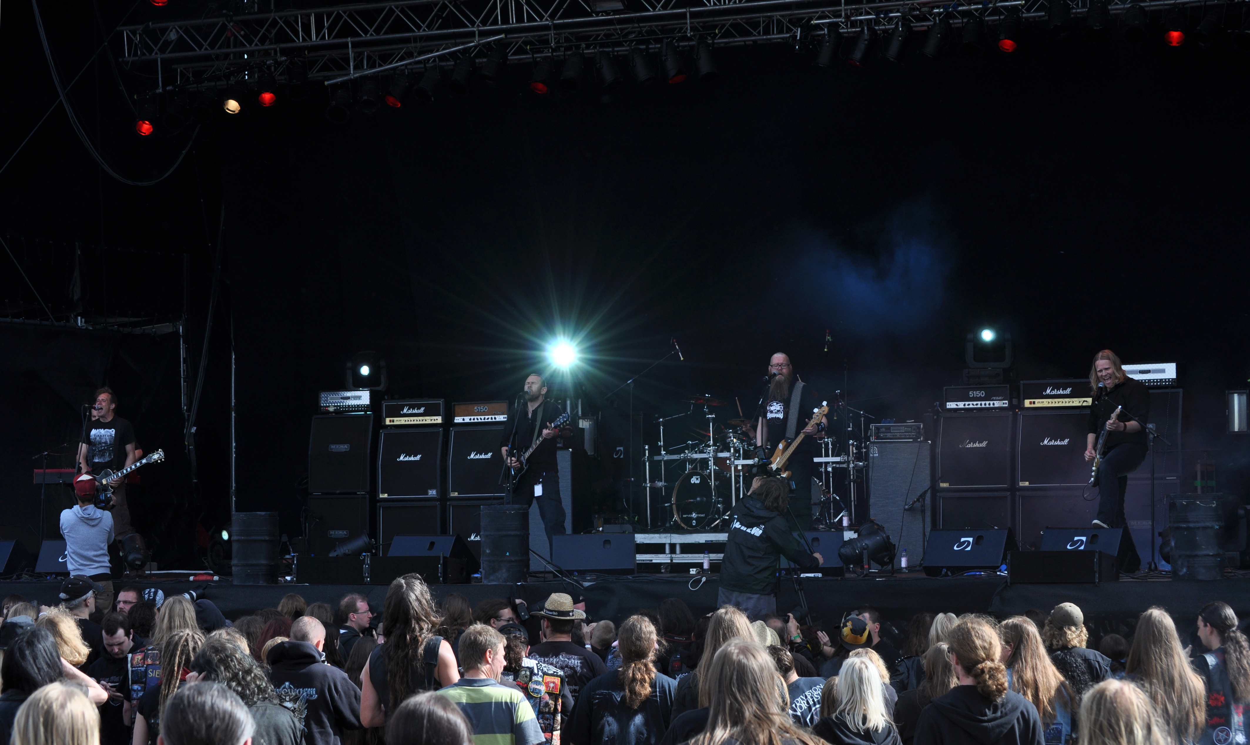 Skálmöld at Party.San Open Air 2012